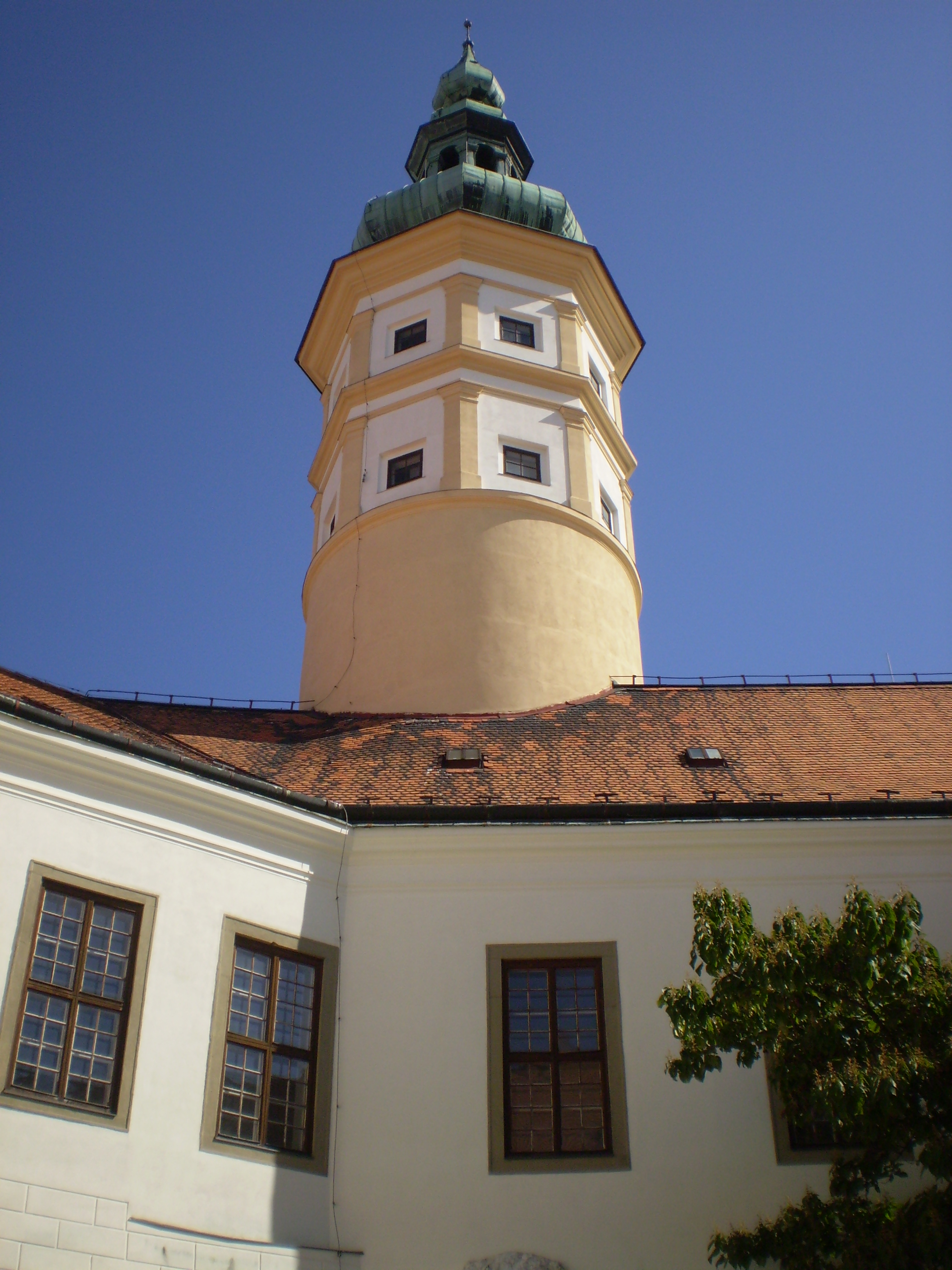 Věž v zámku Mikulov.